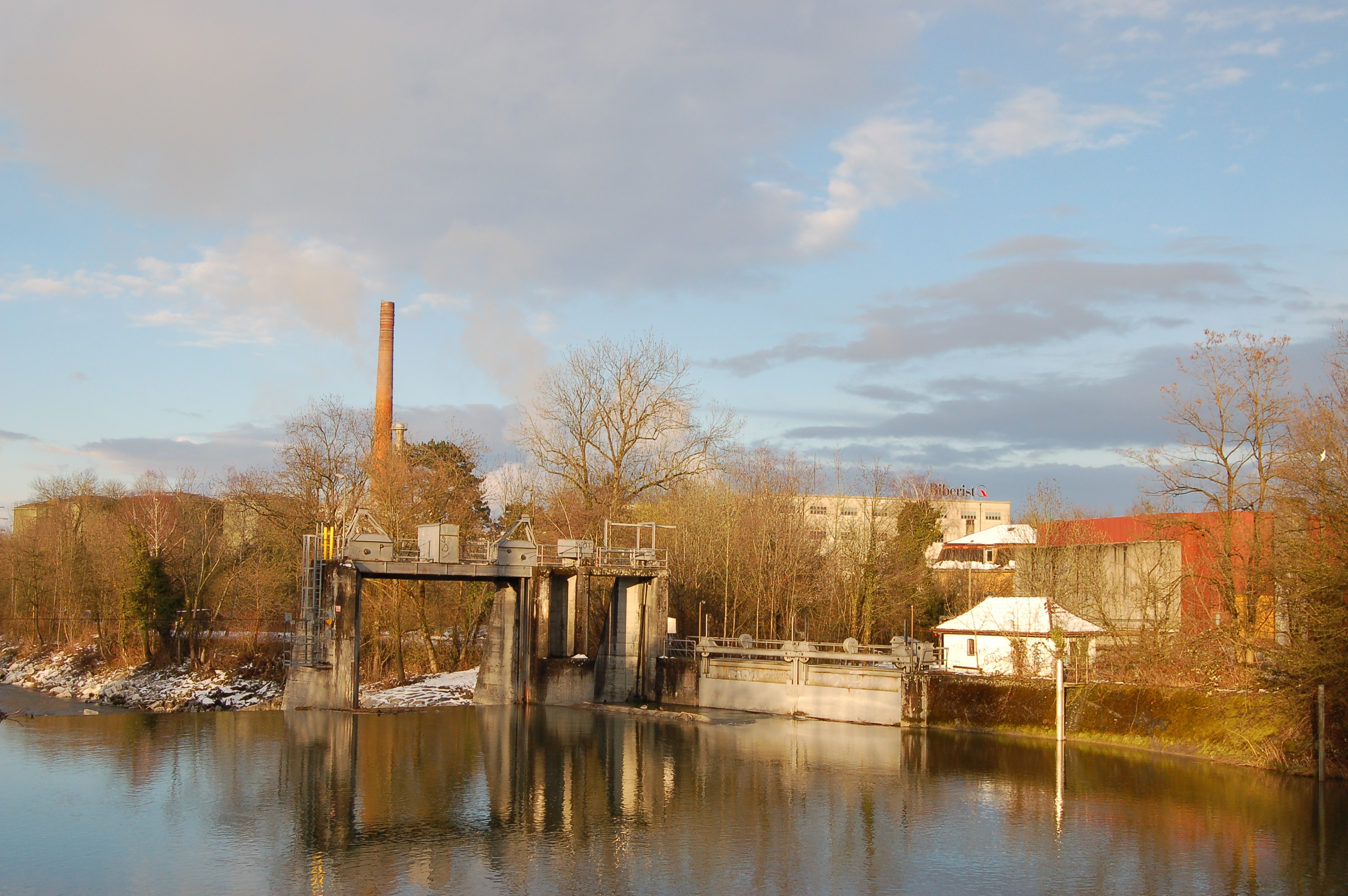 Emme mit Papierfabrik Biberist